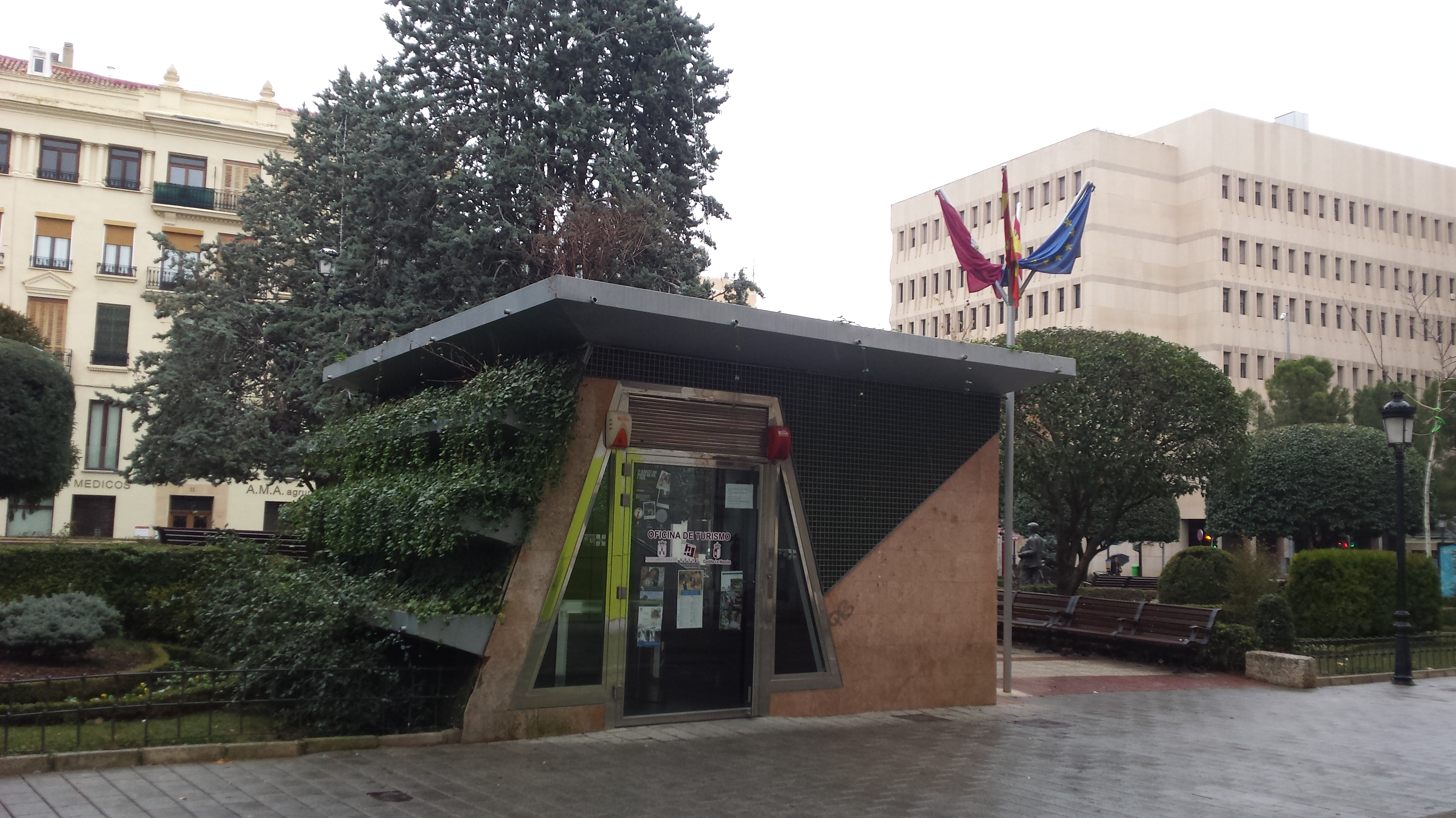 Albacete